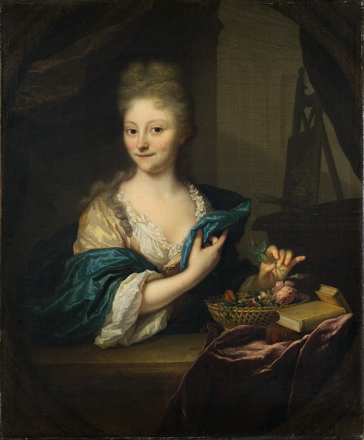 schilderij; portret; portret Amsterdam; vrouwenportret; Backer, Catharina